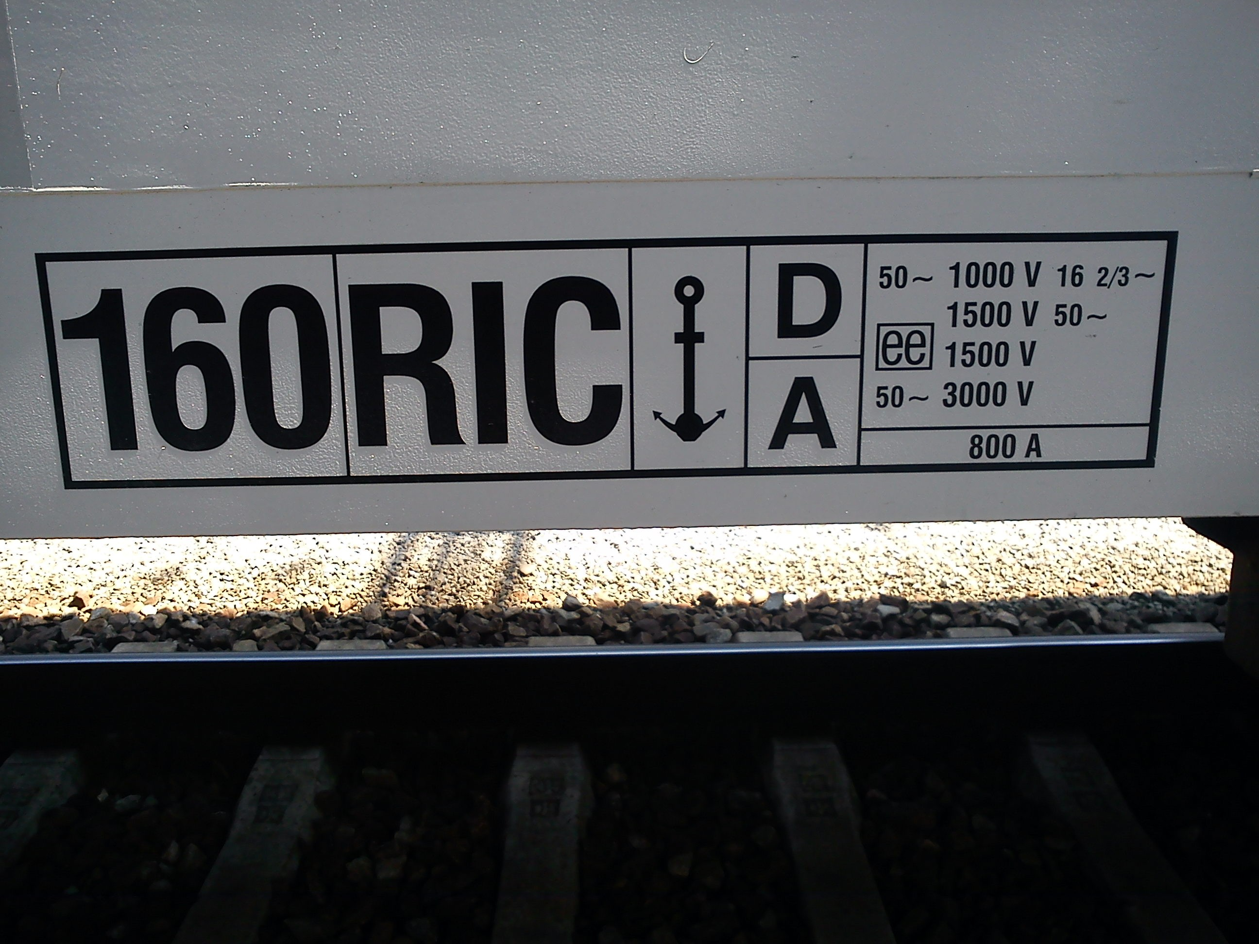 Wagen mit Vierspannungsspeisegerät, dieses verträgt zusätzlich die nicht genormten Systeme 1000V, 50 Hz und 3000V, 50Hz. Beide erleichtern den Einsatz in Tschechien und den Nachbarländern.